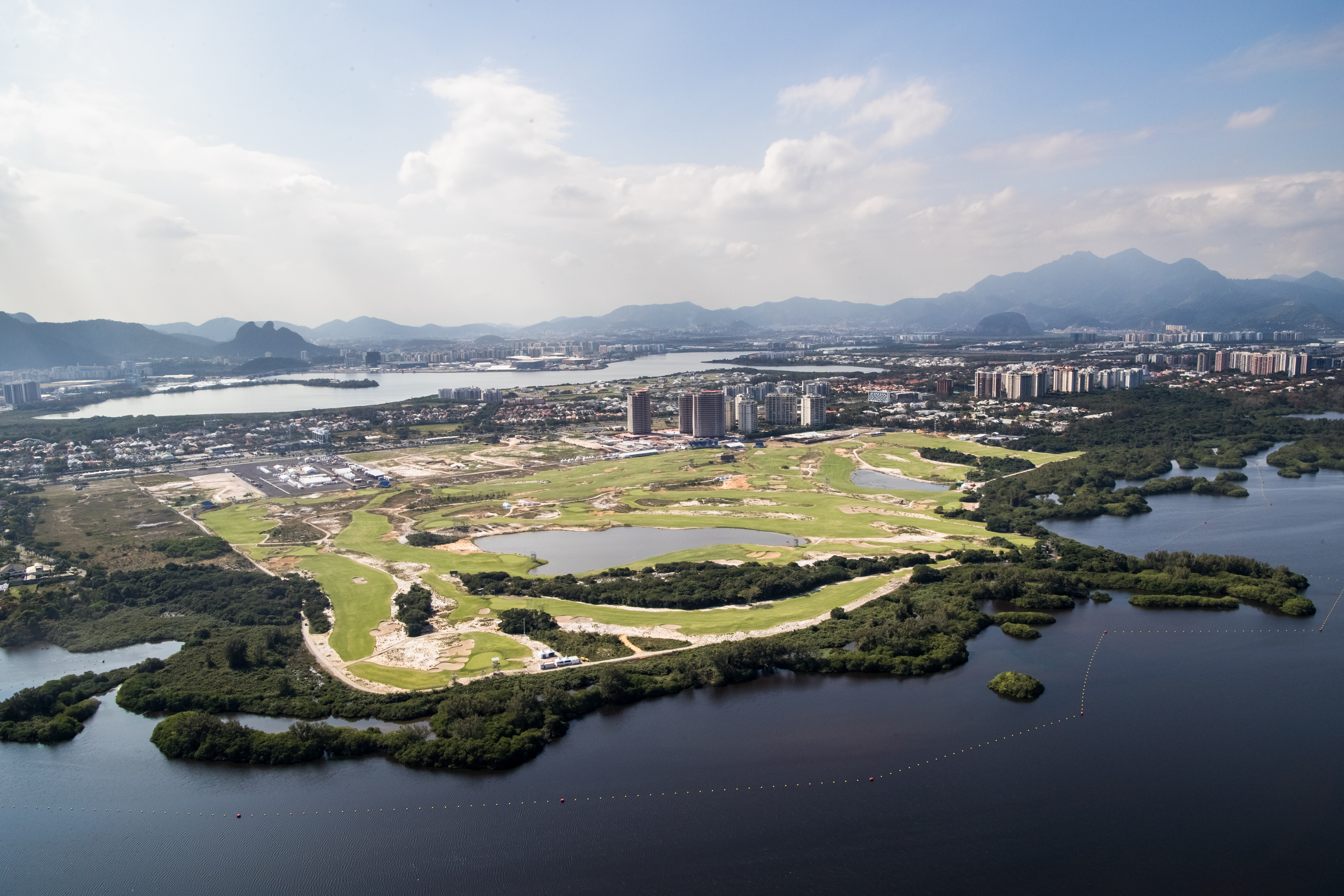 Campo Olímpico de Golfe fica na Região Barra e receberá os atletas de 11 a 14 e 17 a 20 de agosto.